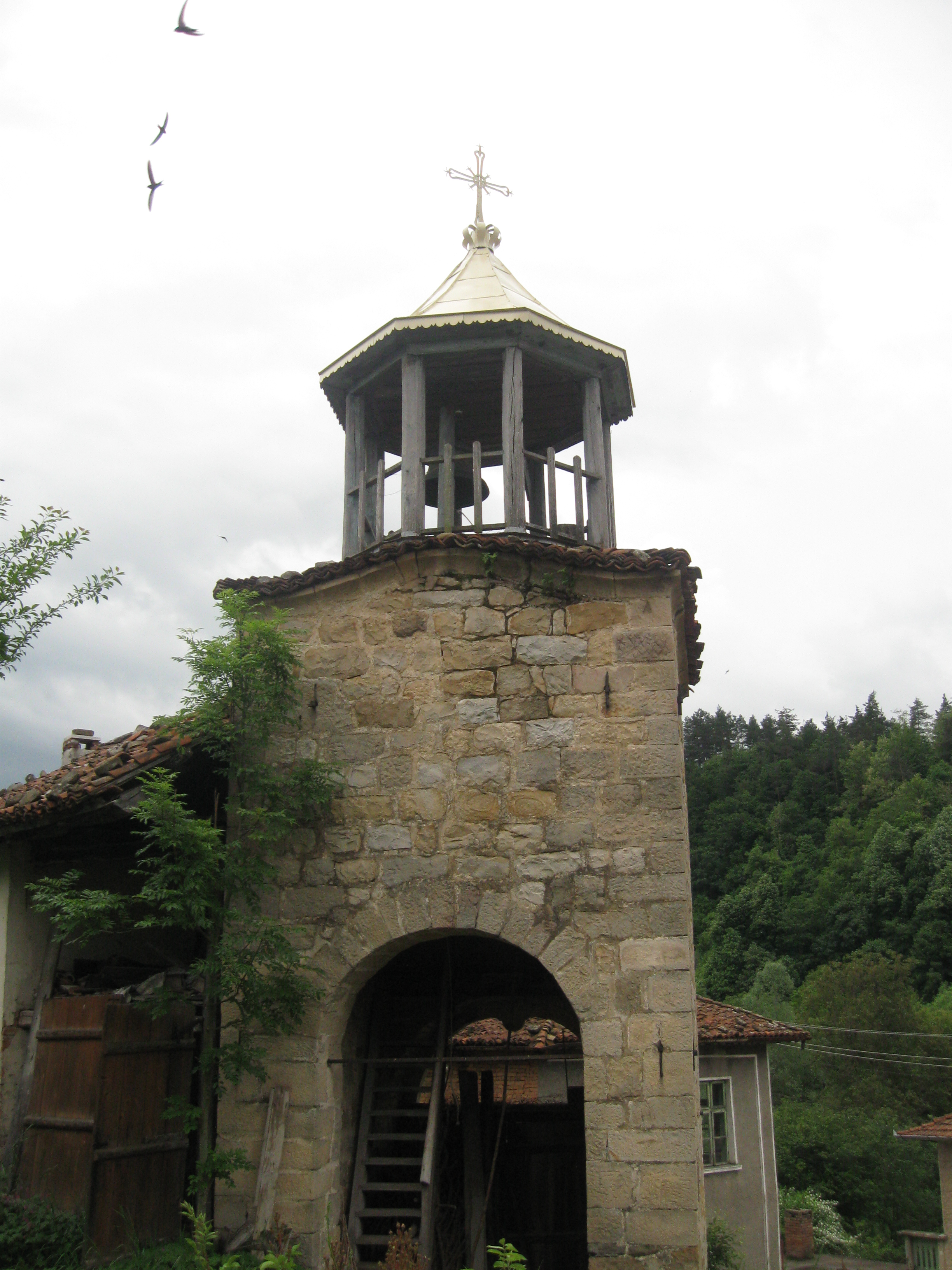 Център